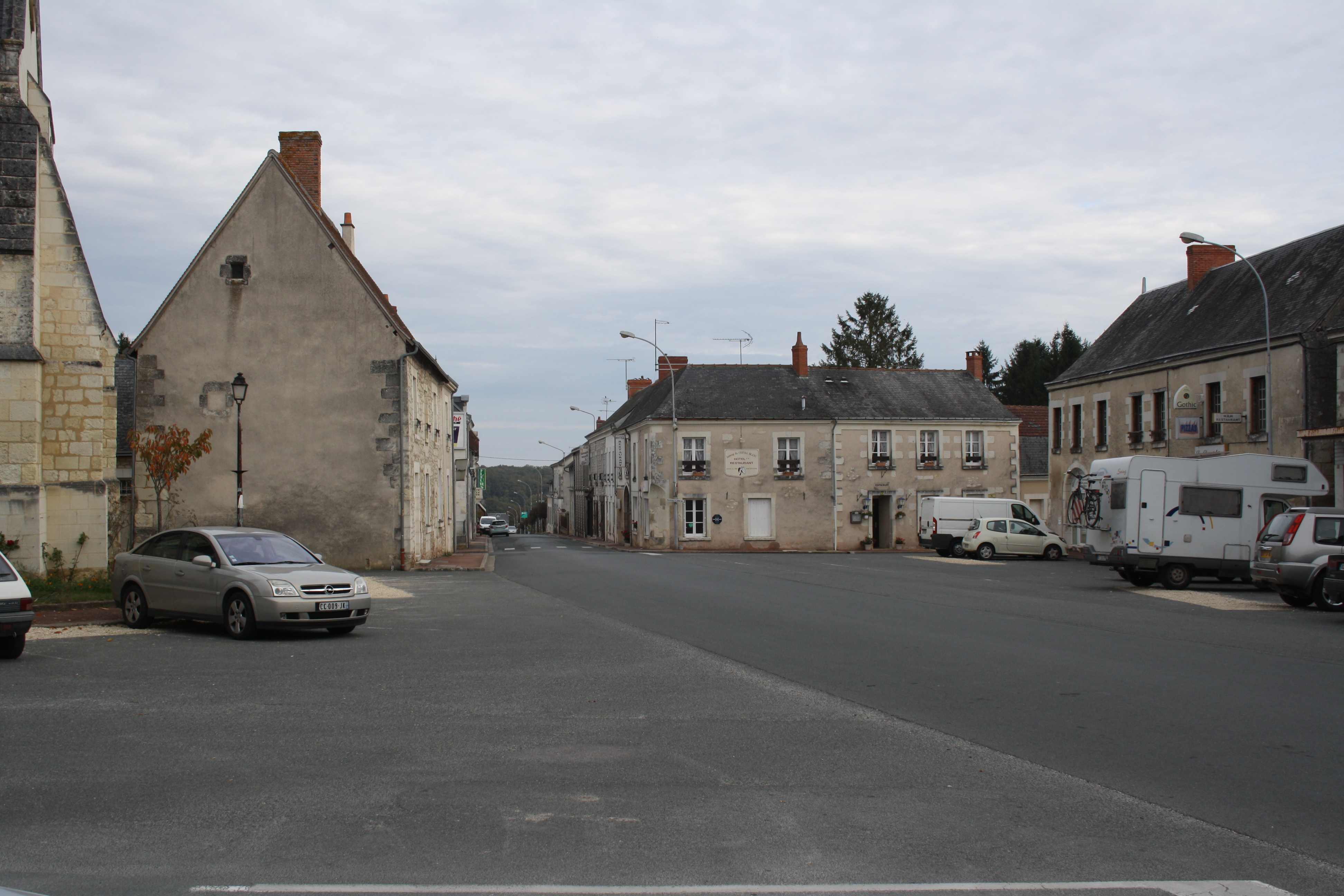 Luçay-le-Mâle, centre village